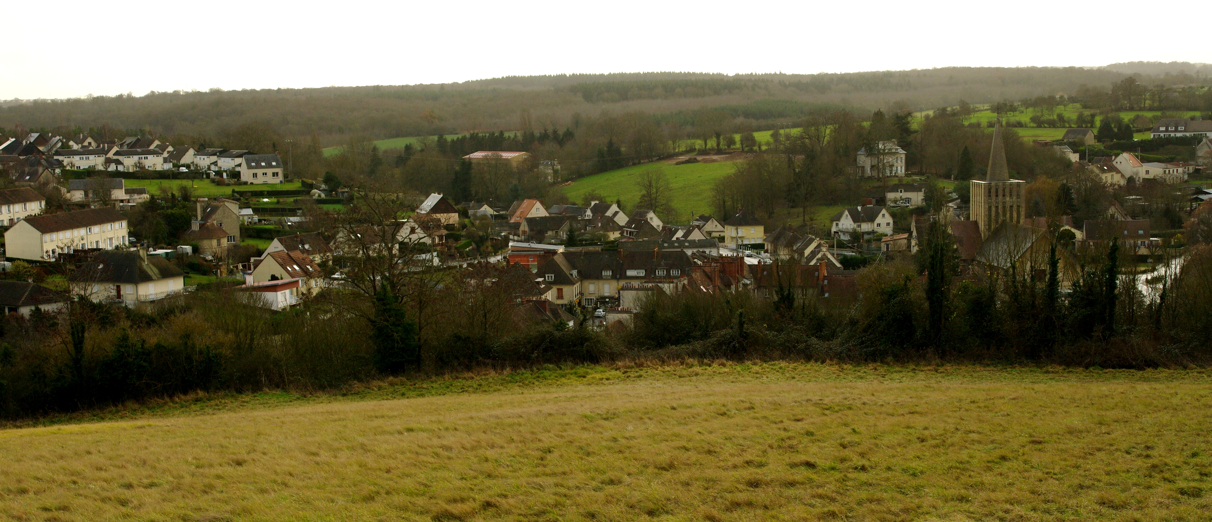 Une vue du bourg de Bretteville-sur-Laize, Calvados.